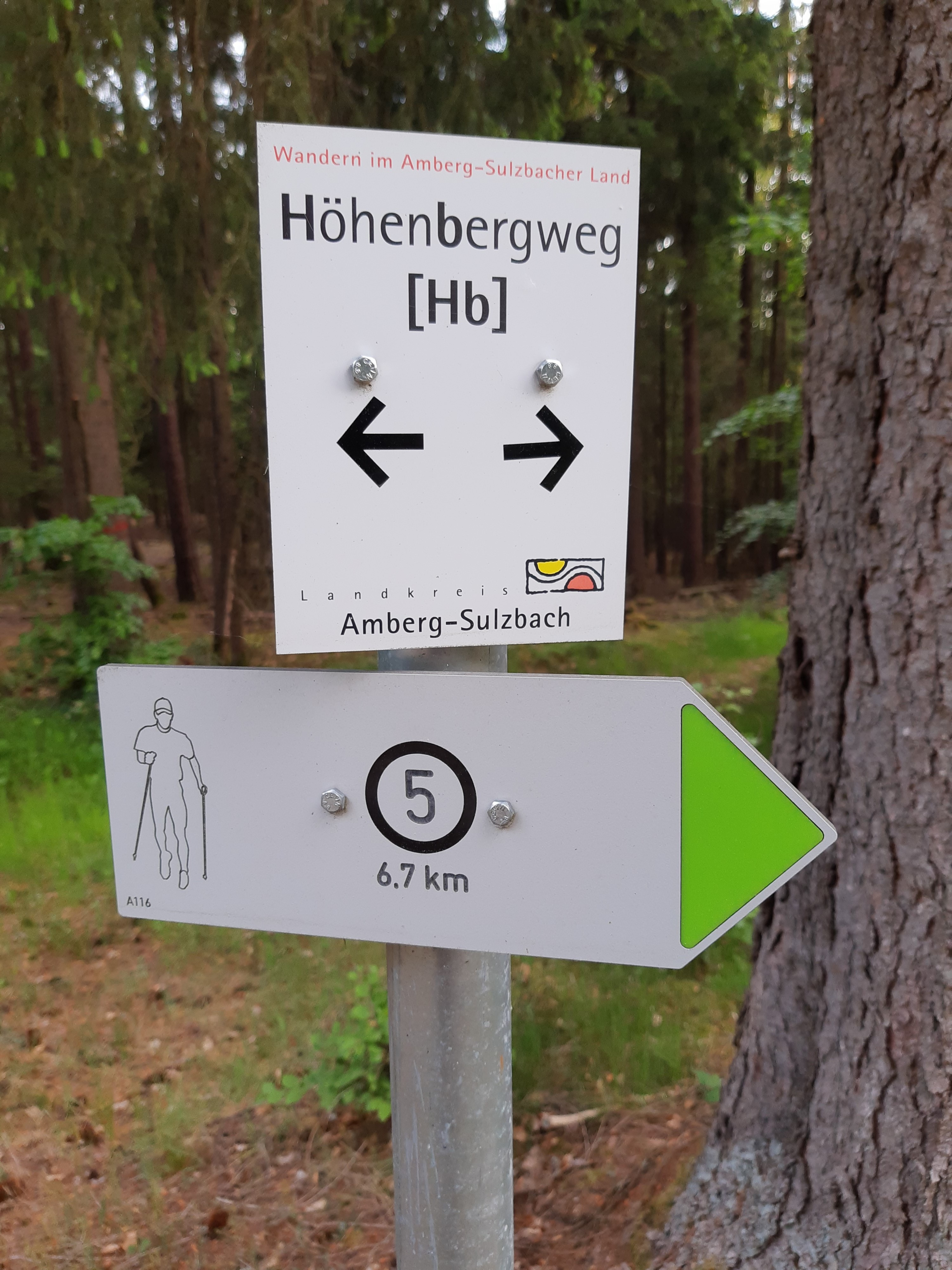 Wanderwegweiser am Friedrichsberg (Naabgebirge)